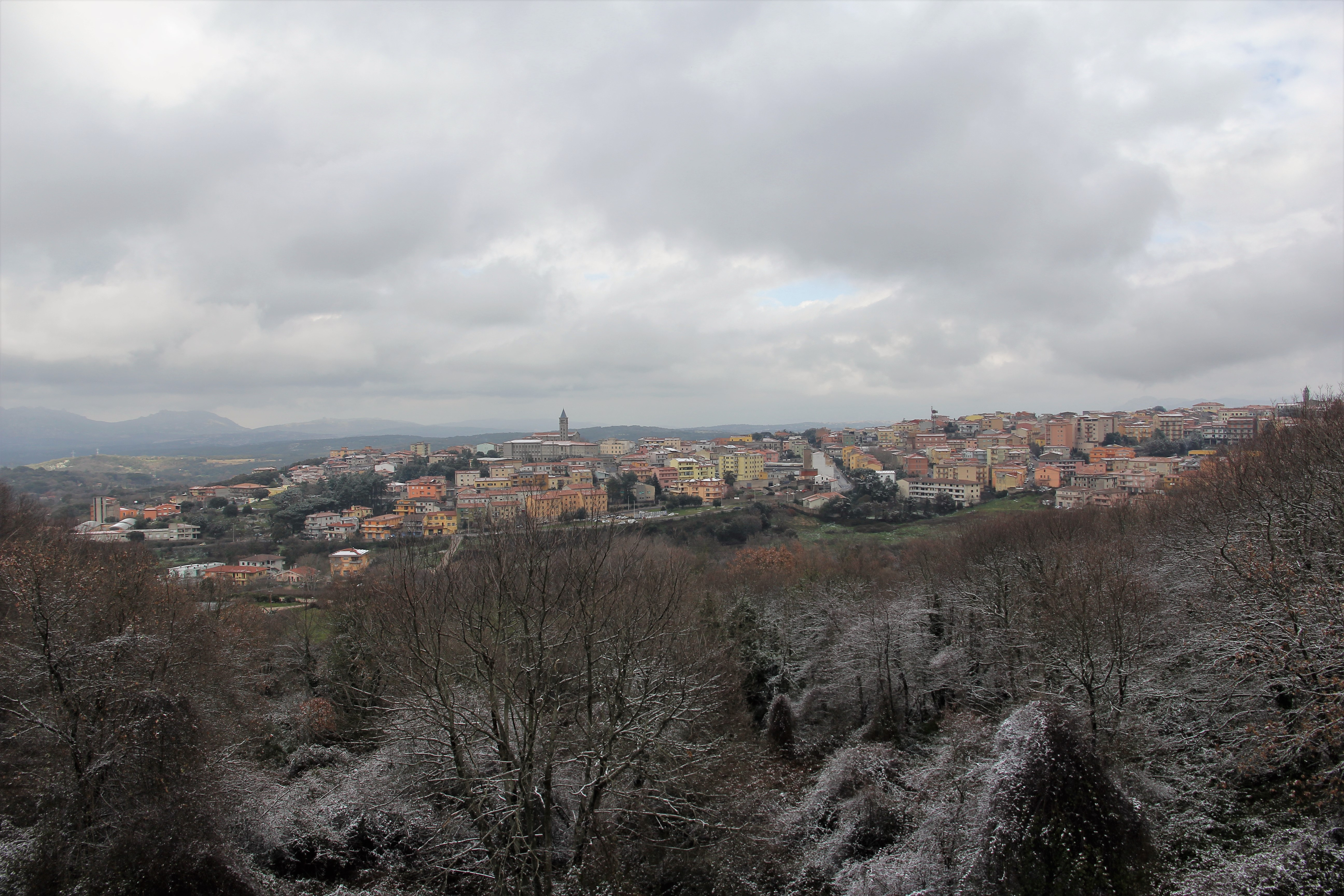 Tempio Pausania